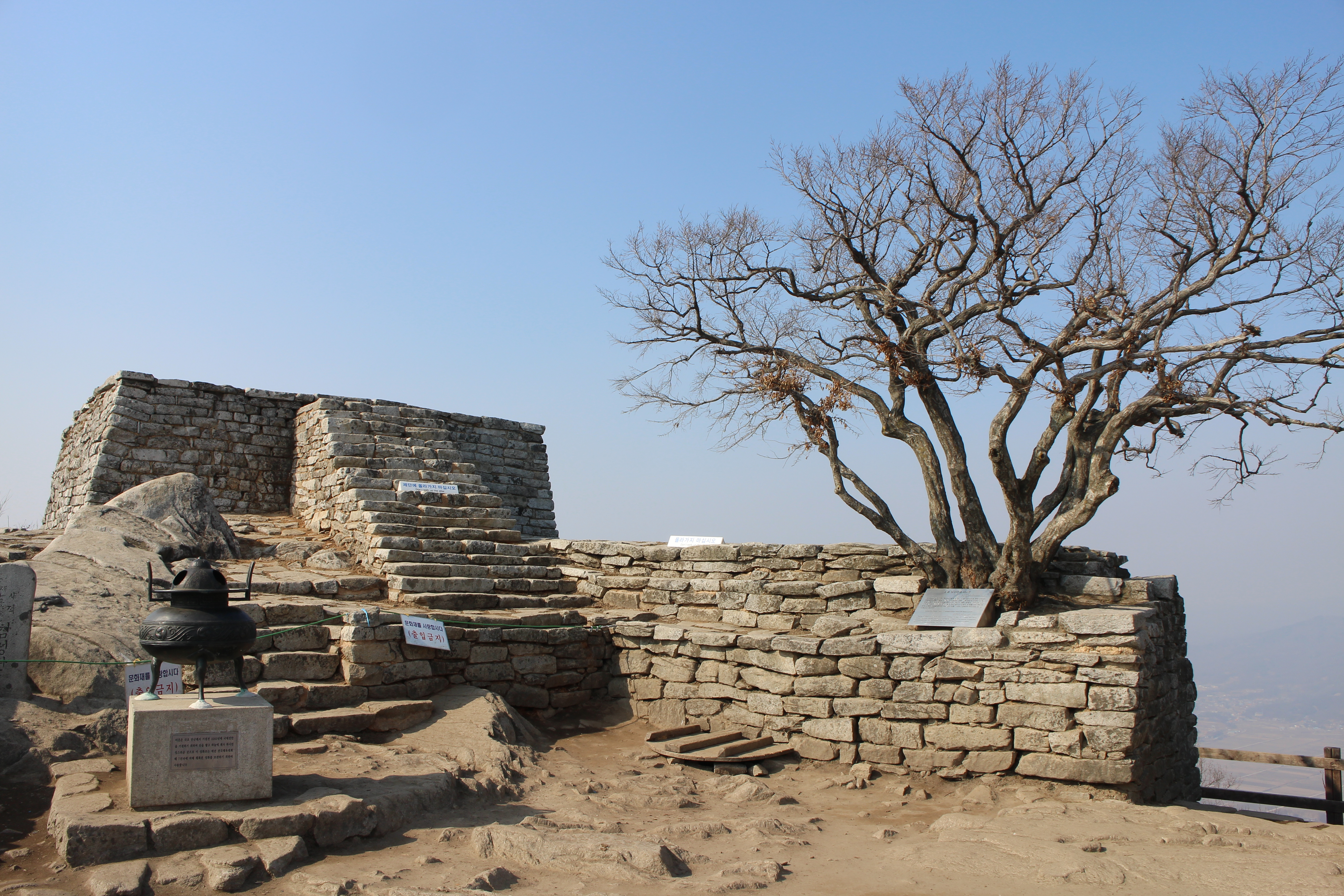 참성단 소사나무